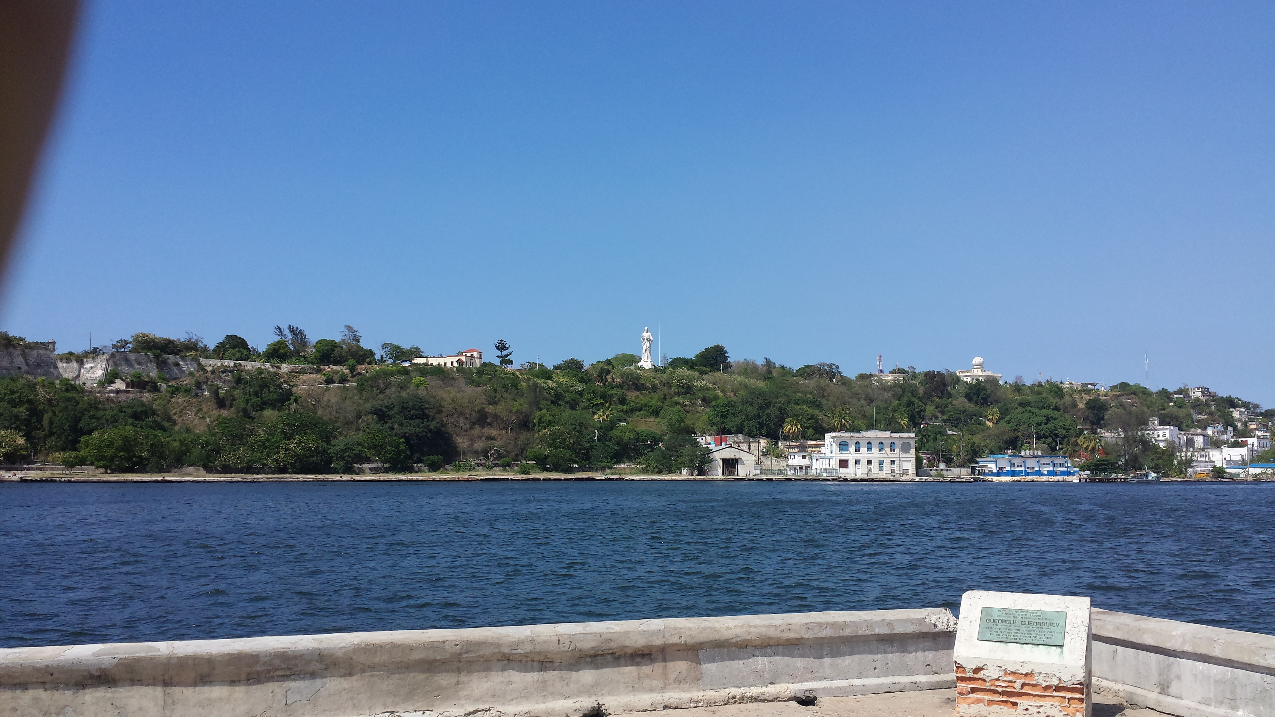 Vista del Cristo de La Habana desde el otro lado de la Bahia.